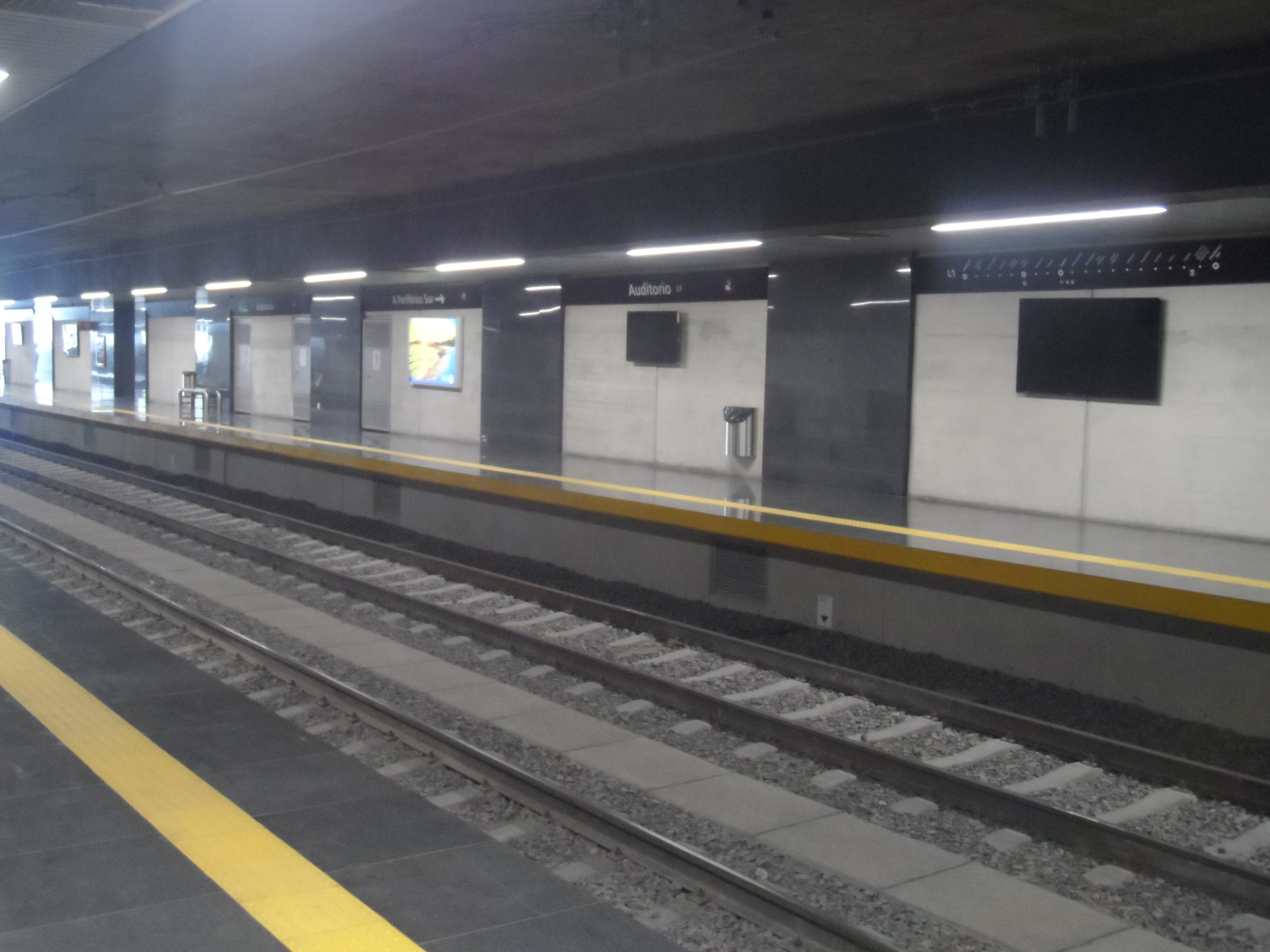 Andenes de la nueva estación "Auditorio" de la Línea 1 del Tren Ligero de Guadalajara.